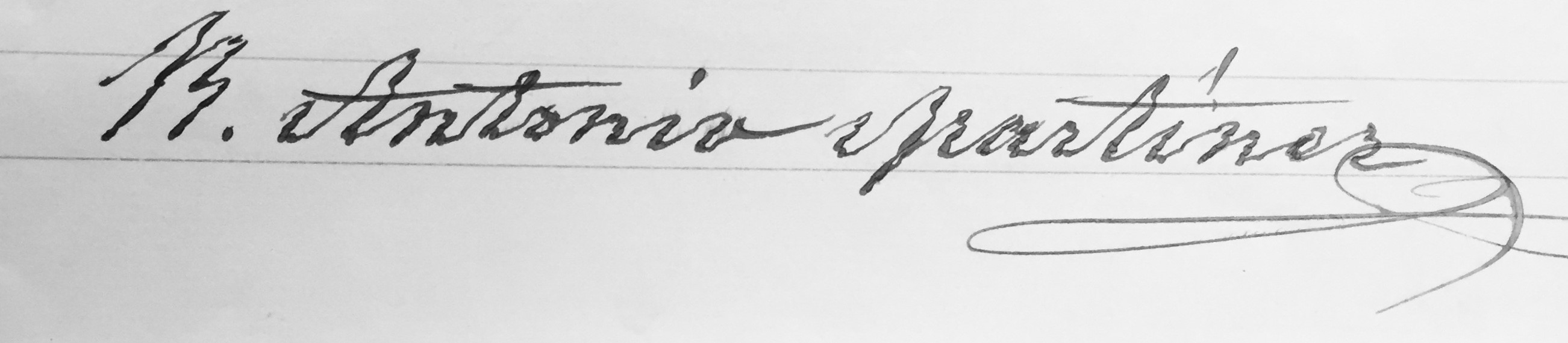 Firma de Rito Antonio Martínez del 3 de septiembre de 1889, un mes antes de su fallecimiento